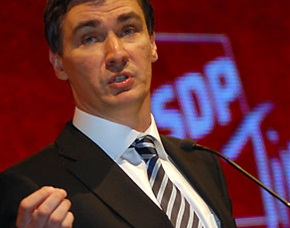 Zoran Milanović